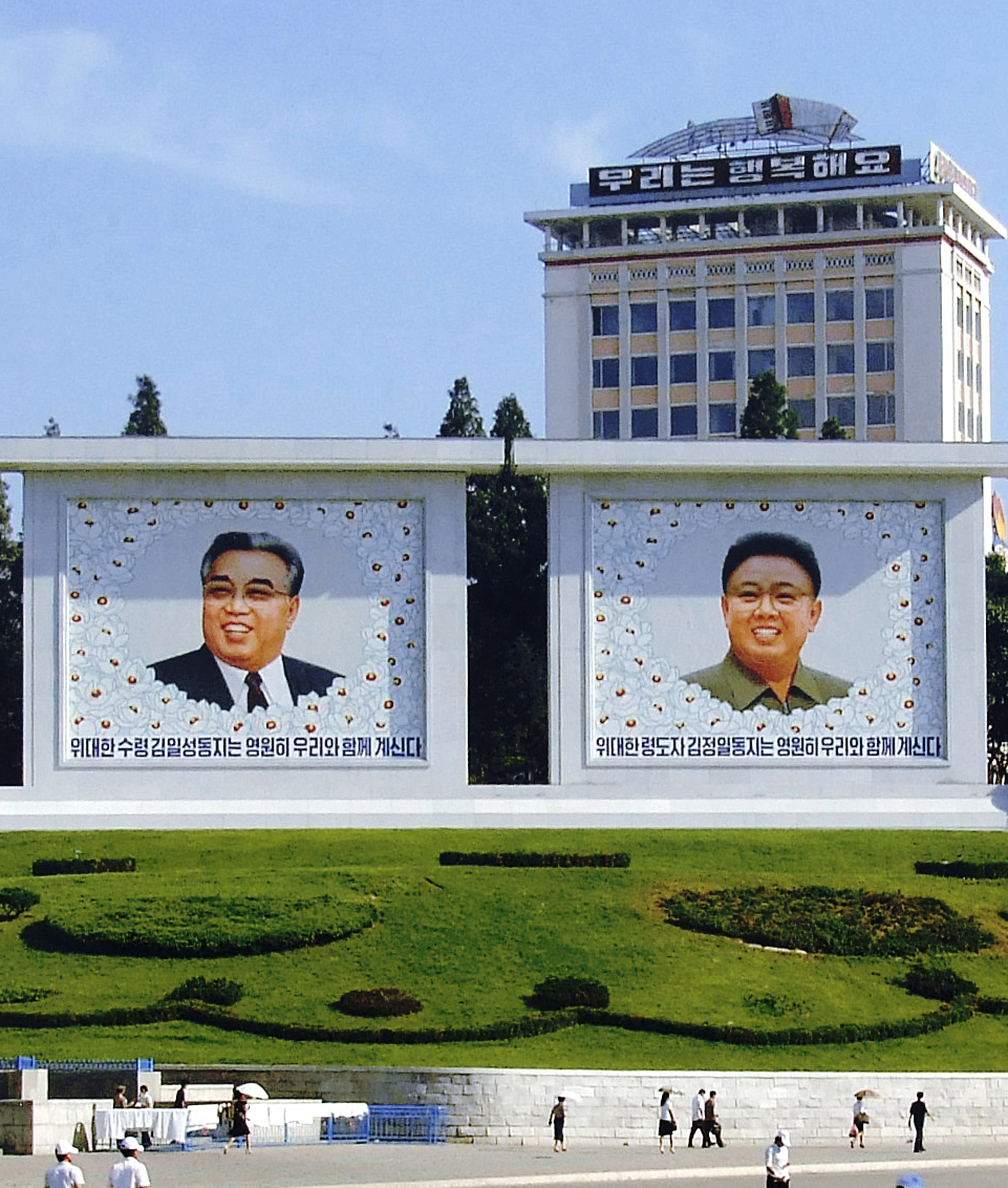 Murales de los líderes en Pyongyang. El eslógan del edificio reza «Somos felices» [우리는 행복해요]